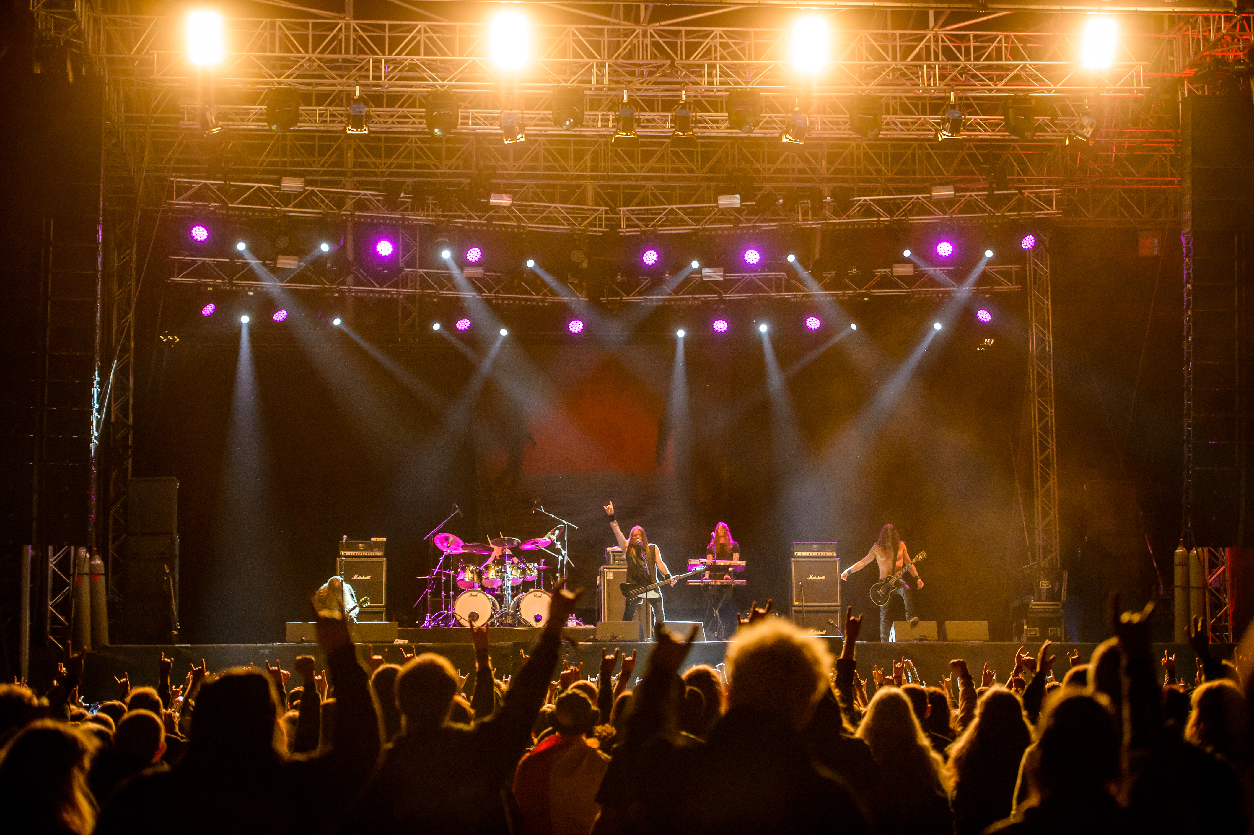 'RockHarz Open Air 2016; Ballenstedt': 'Enslaved'